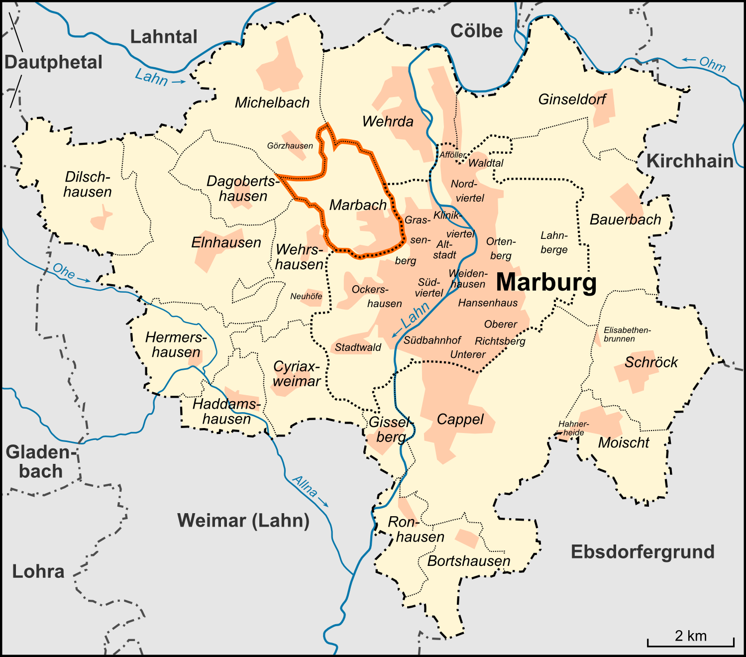 Karte des Stadtteils Marbach der Stadt Marburg